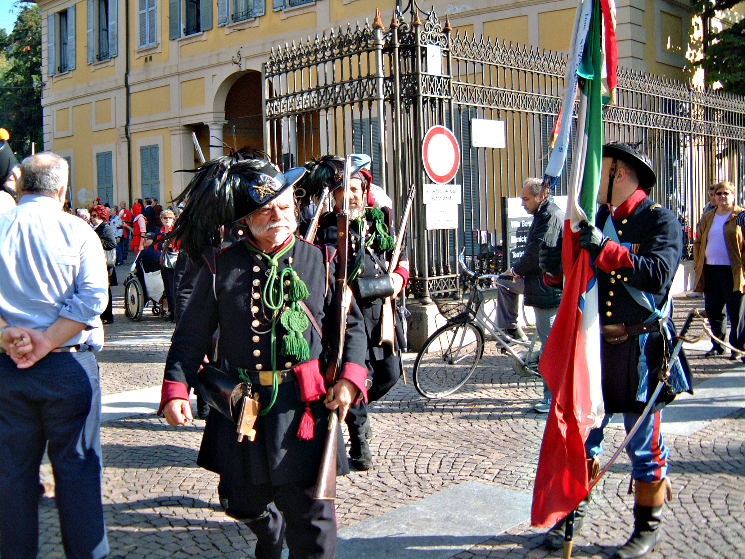 Edizione 2010 della Fiera di Sant'Eustorgio, rivisitazione storica.